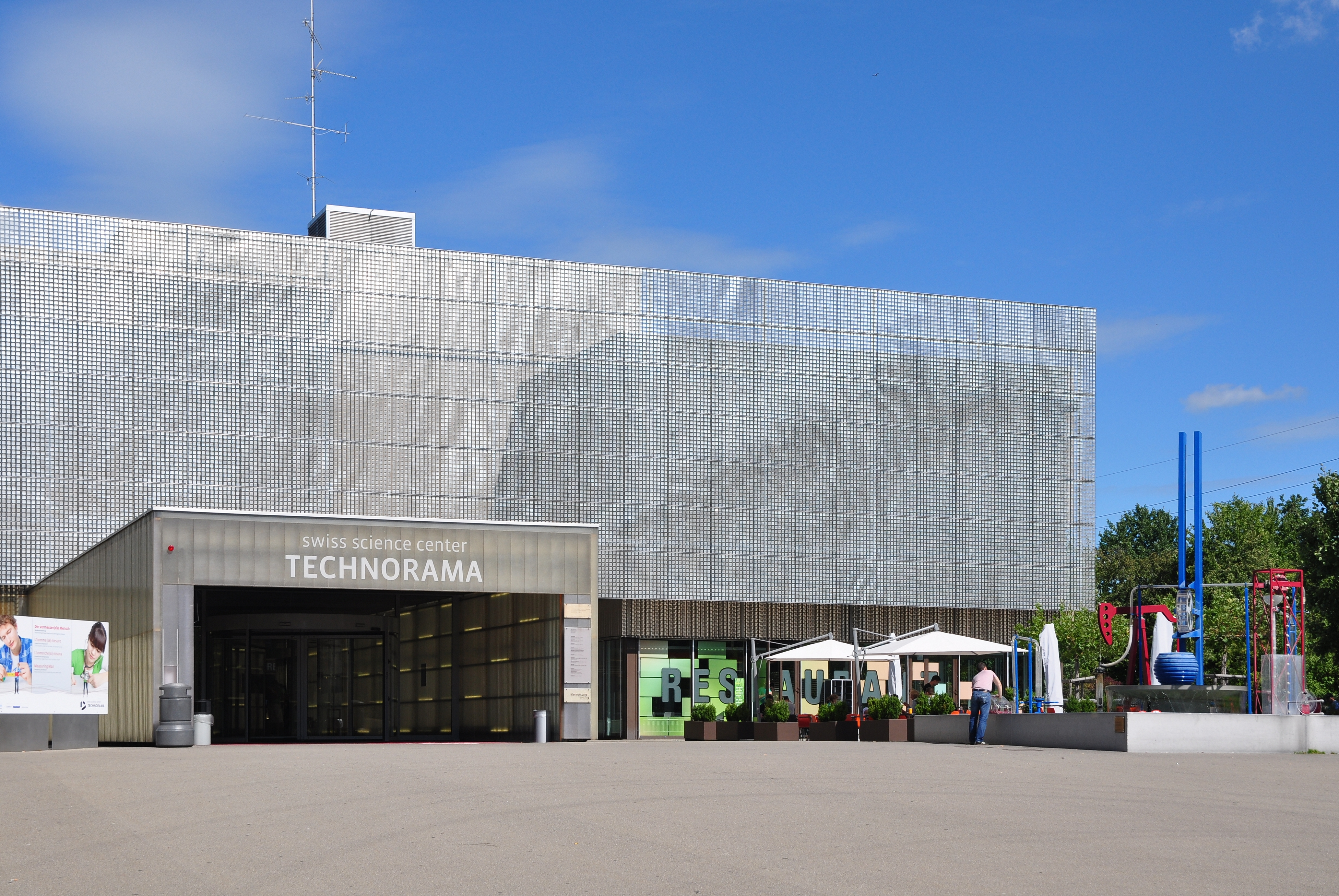 Technorama, Technoramastrasse 1 in Winterthur (Switzerland)